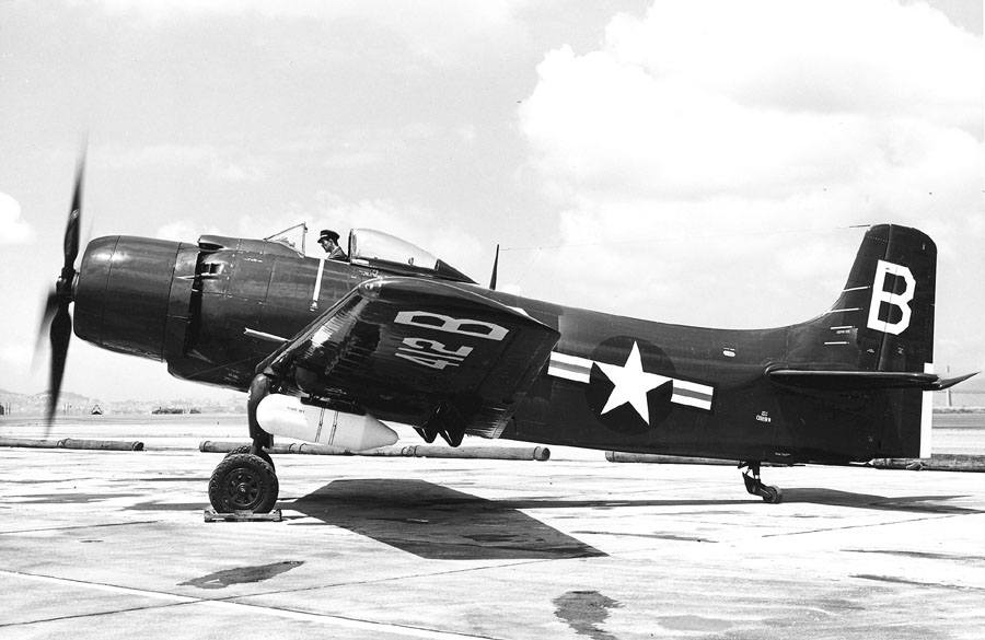 NAS Alameda June 1947.